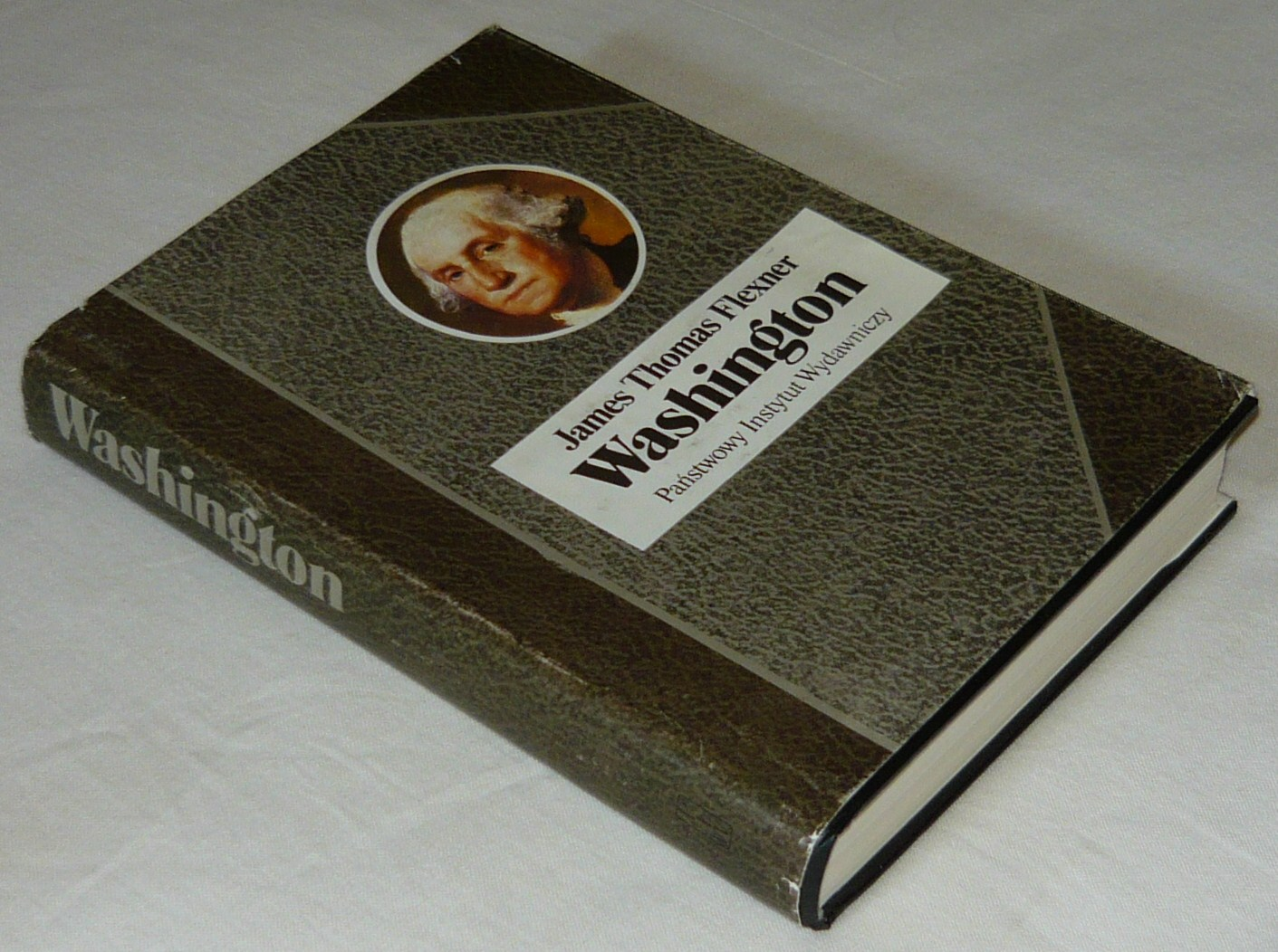 Biografia Jerzego Waszyngtona, pióra Jamesa Thomasa Flexnera. Seria Biografie Sławnych Ludzi wydawnictwa PIW, wyd. 1990.